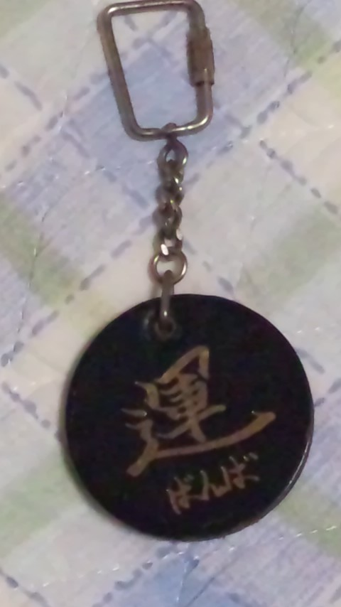 運ホルダー前面